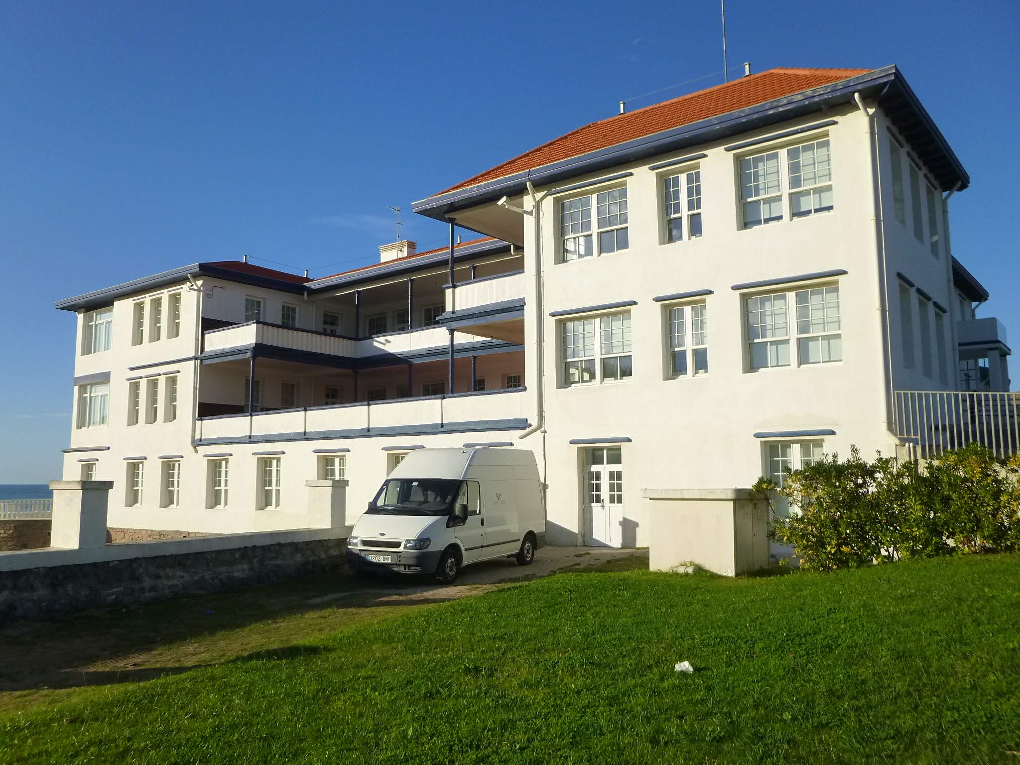 Estación Marina de Plentzia (antiguo sanatorio), junto a Gorliz (Plencia, Vizcaya, País Vasco, España)